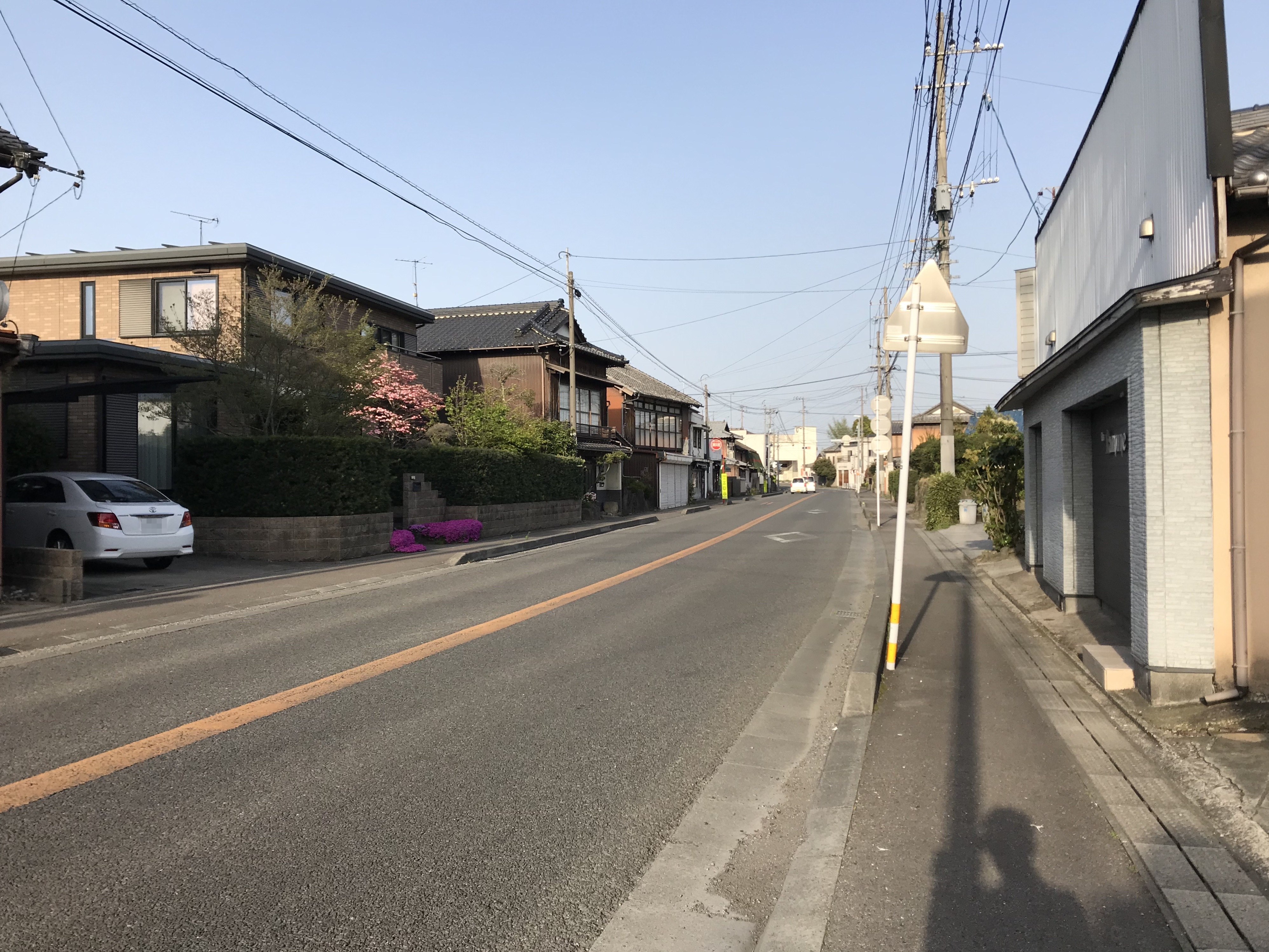 柳ヶ浦駅と小松橋間の大分県道23号